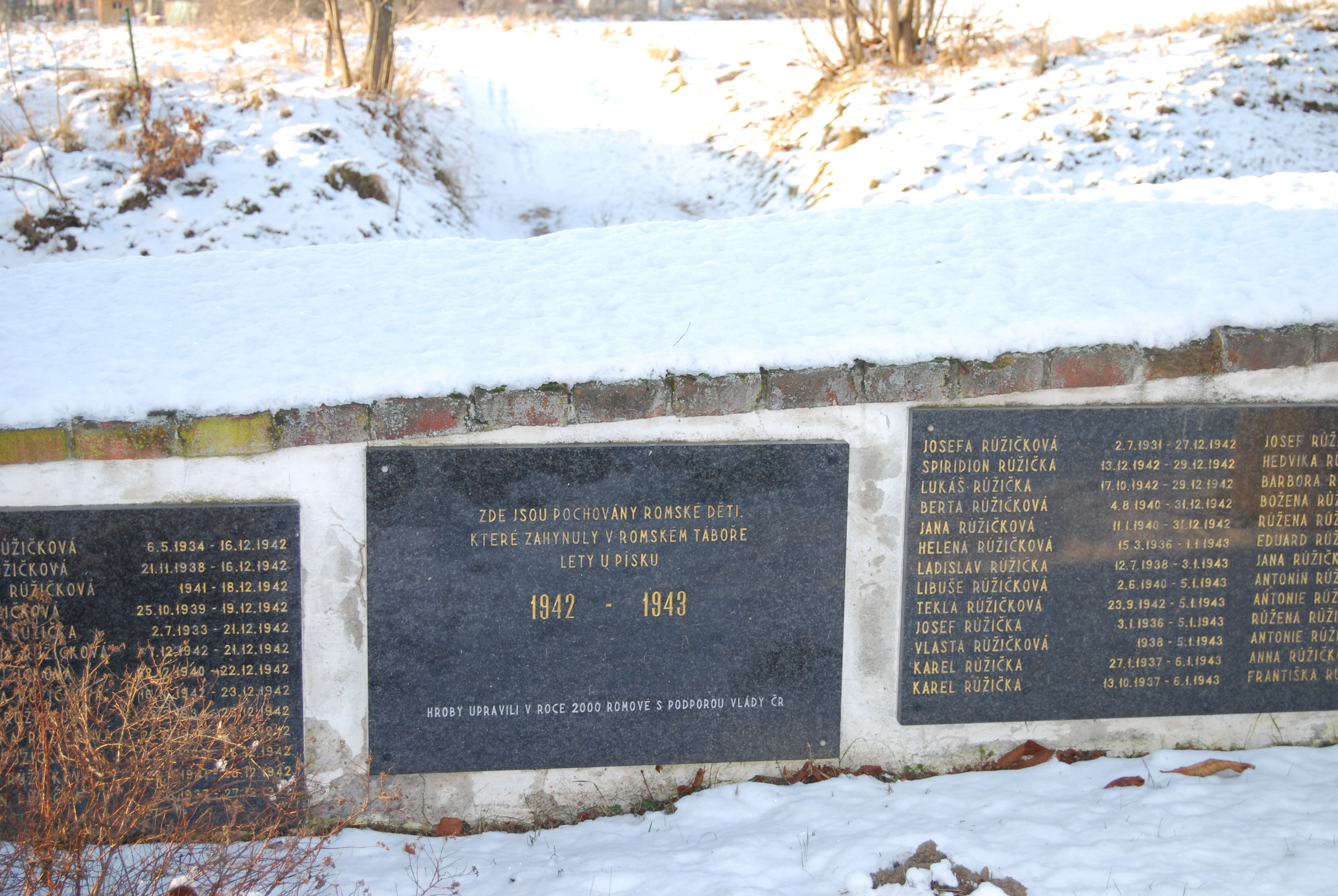 Celkový pohled na pamětní desky romským dětem na místním hřbitově. Mirovice. Okres Písek. Česká republika.